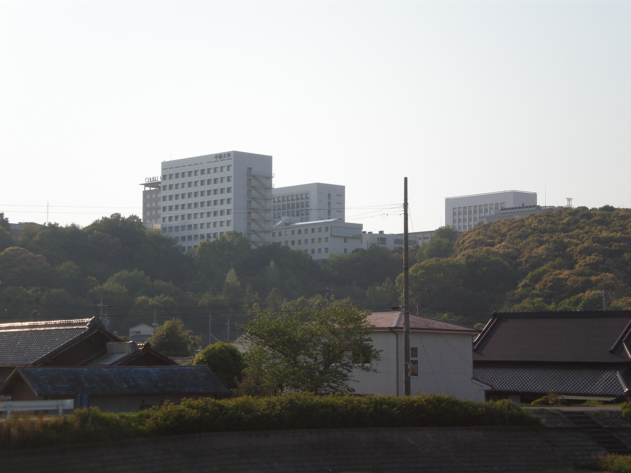 愛知県春日井市にある中部大学